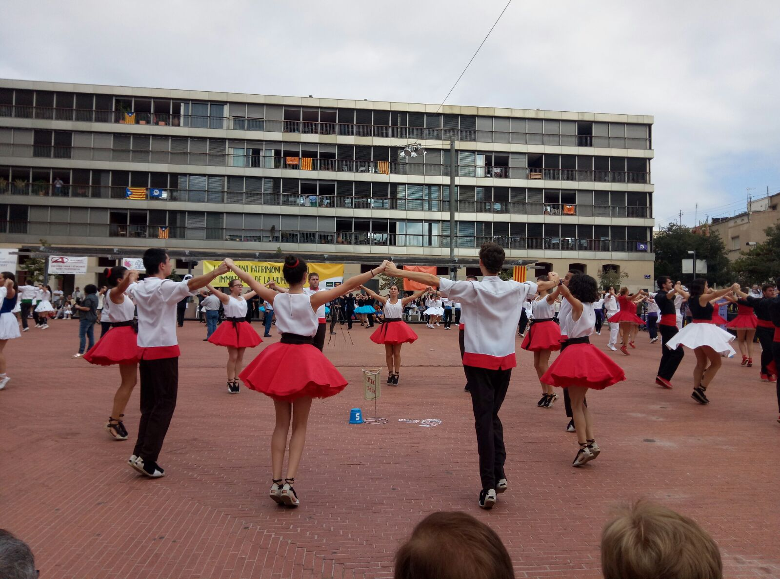 Colla Riallera al concurs de Terrassa 2017